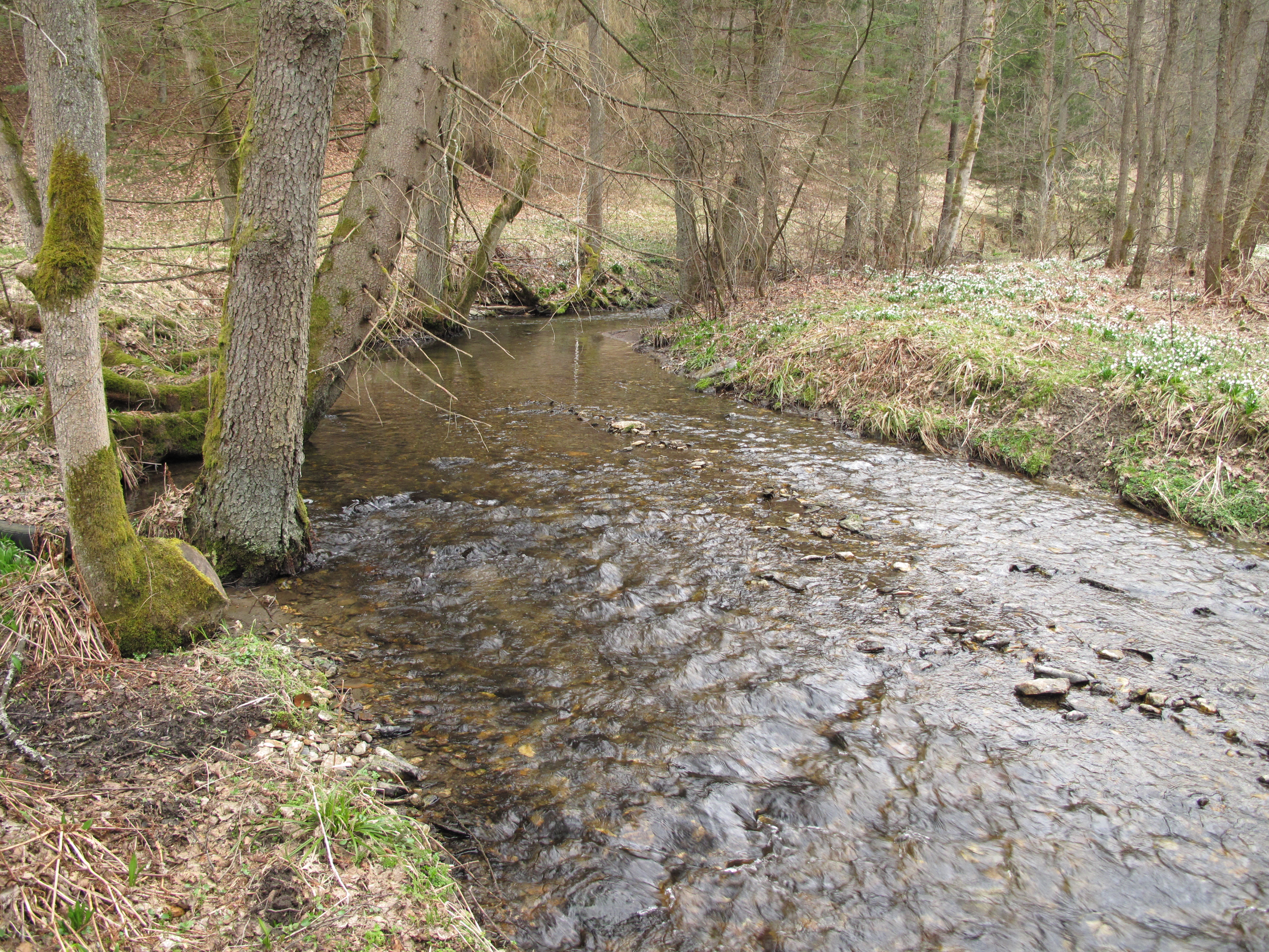 Potok Zlatník u Lhotky. Okres Jablonec nad Nisou, Česká republika.